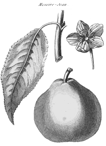 Rozier. Cours d'agriculture, tome 8, planche 9, messire-jean (poire)